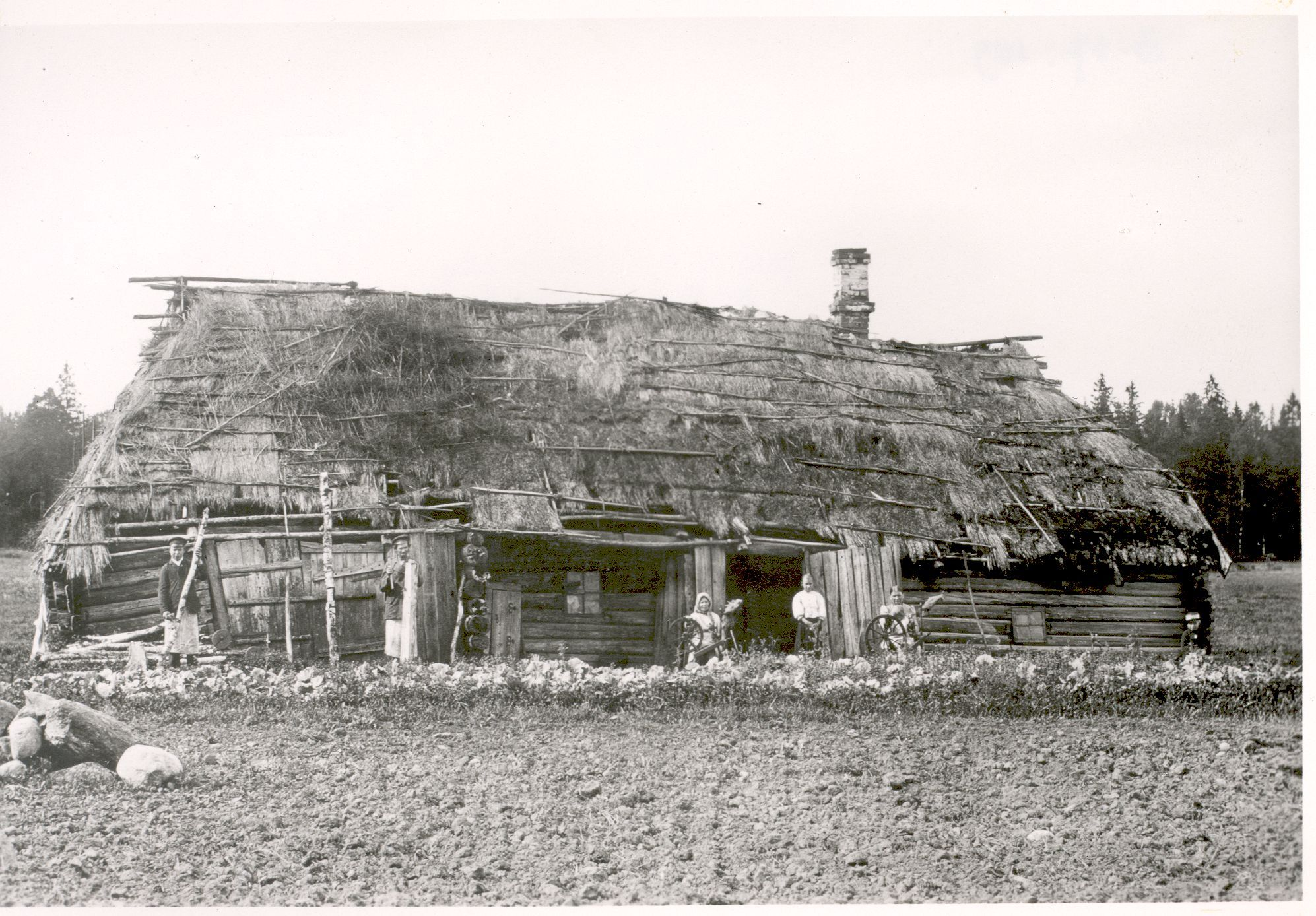 Eestlase elumaja renditud maal 19. saj lõpp